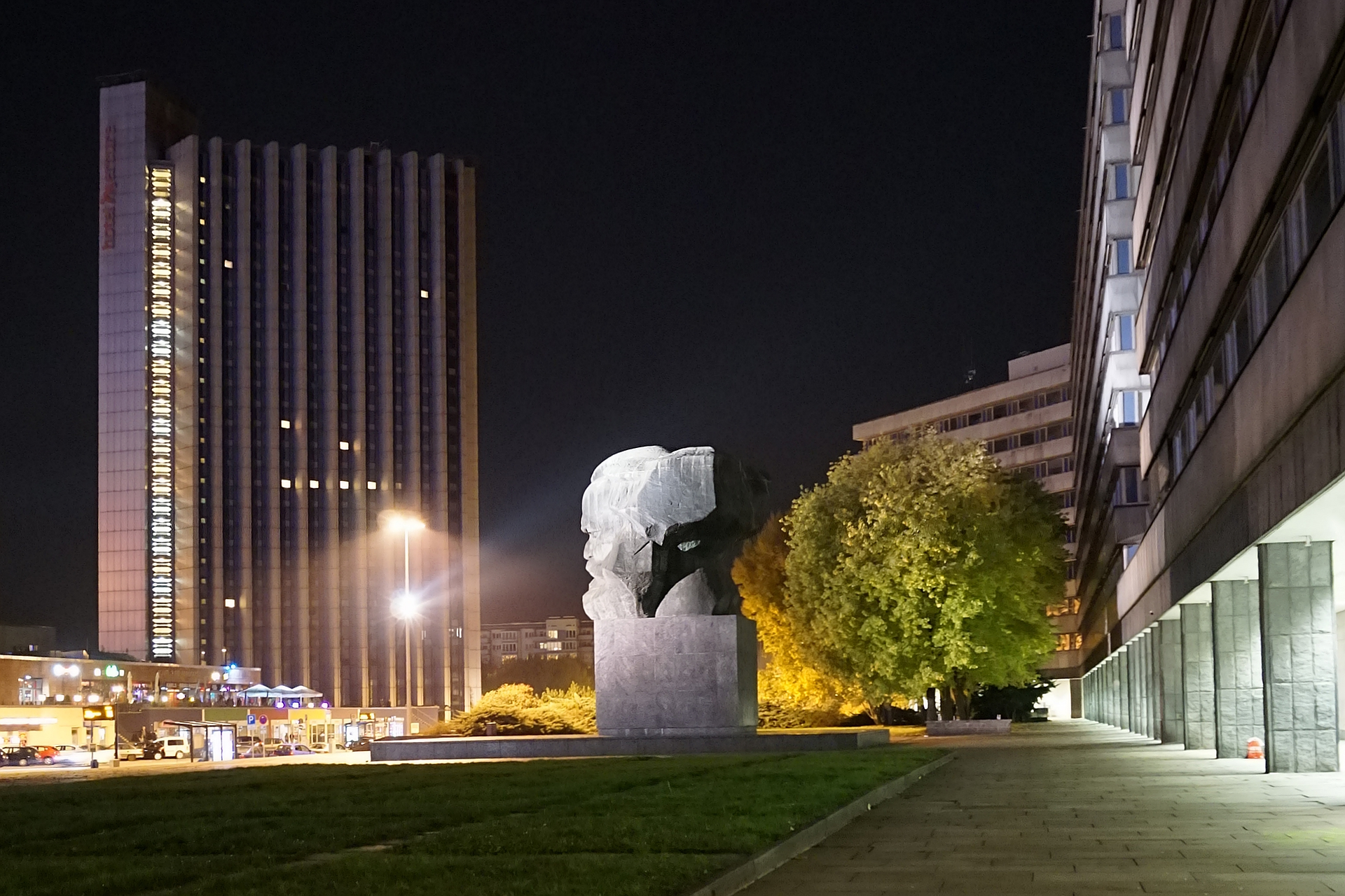 Das ehemalige Karl-Marx-Forum mit dem 1971 eingeweihten Karl-Marx-Monument in Chemnitz